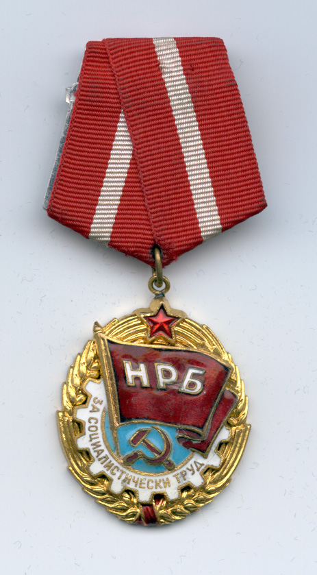 Орден „Червено Знаме на Труда“ учреден на 13 декември 1950г.